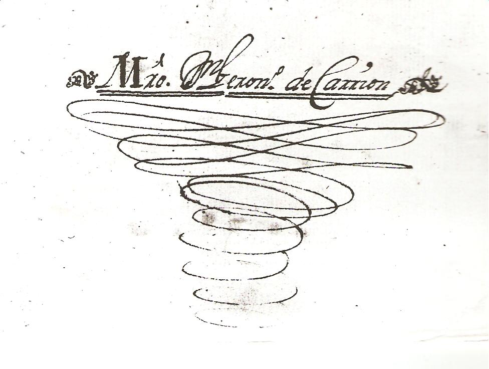 Firma de Jerónimo de Carrión, maestro de capilla de la Catedral de Segovia 1692-1721